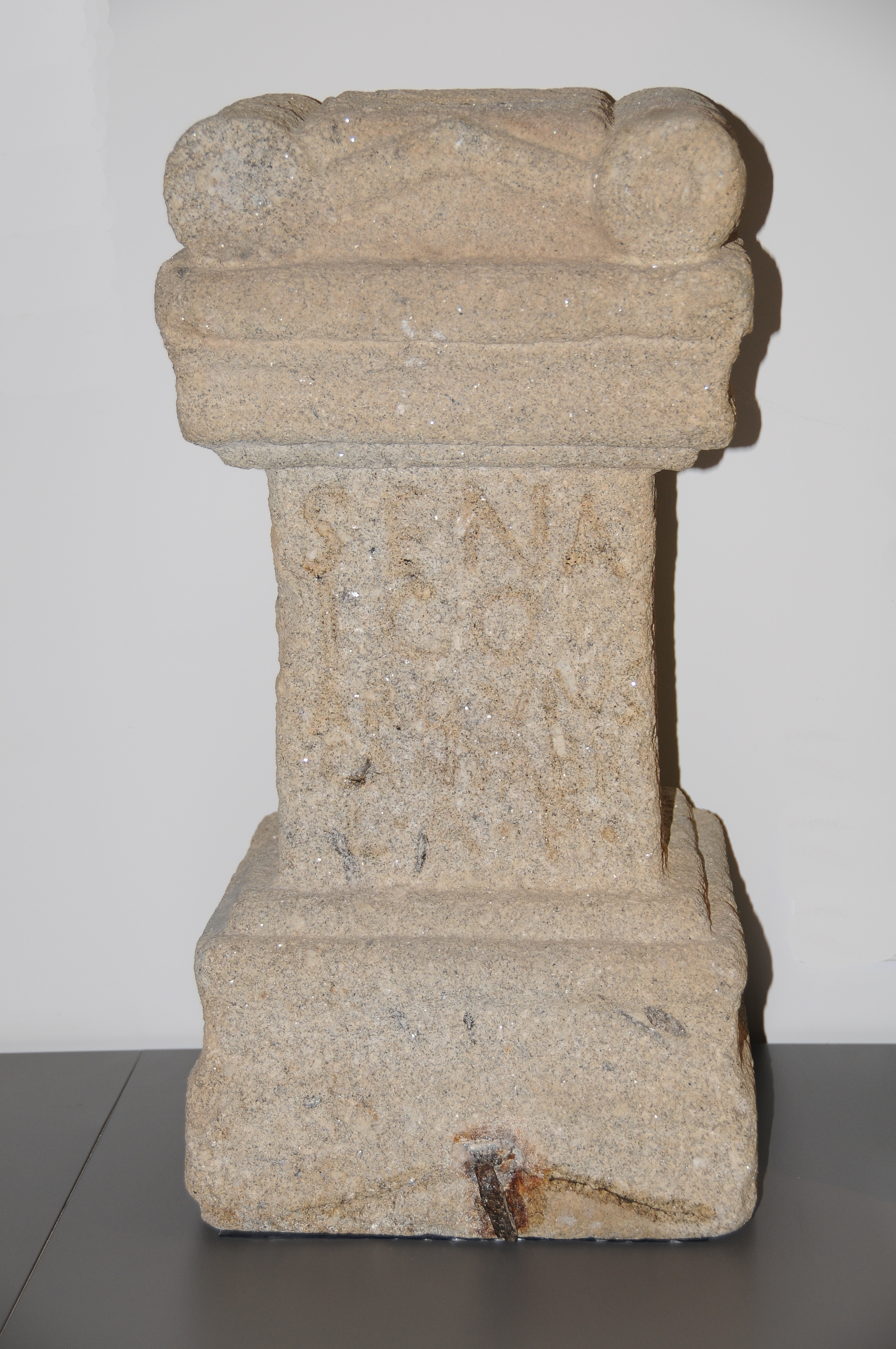 Ancient Roman inscription in D. Diogo de Sousa Museum, Braga, Portugal